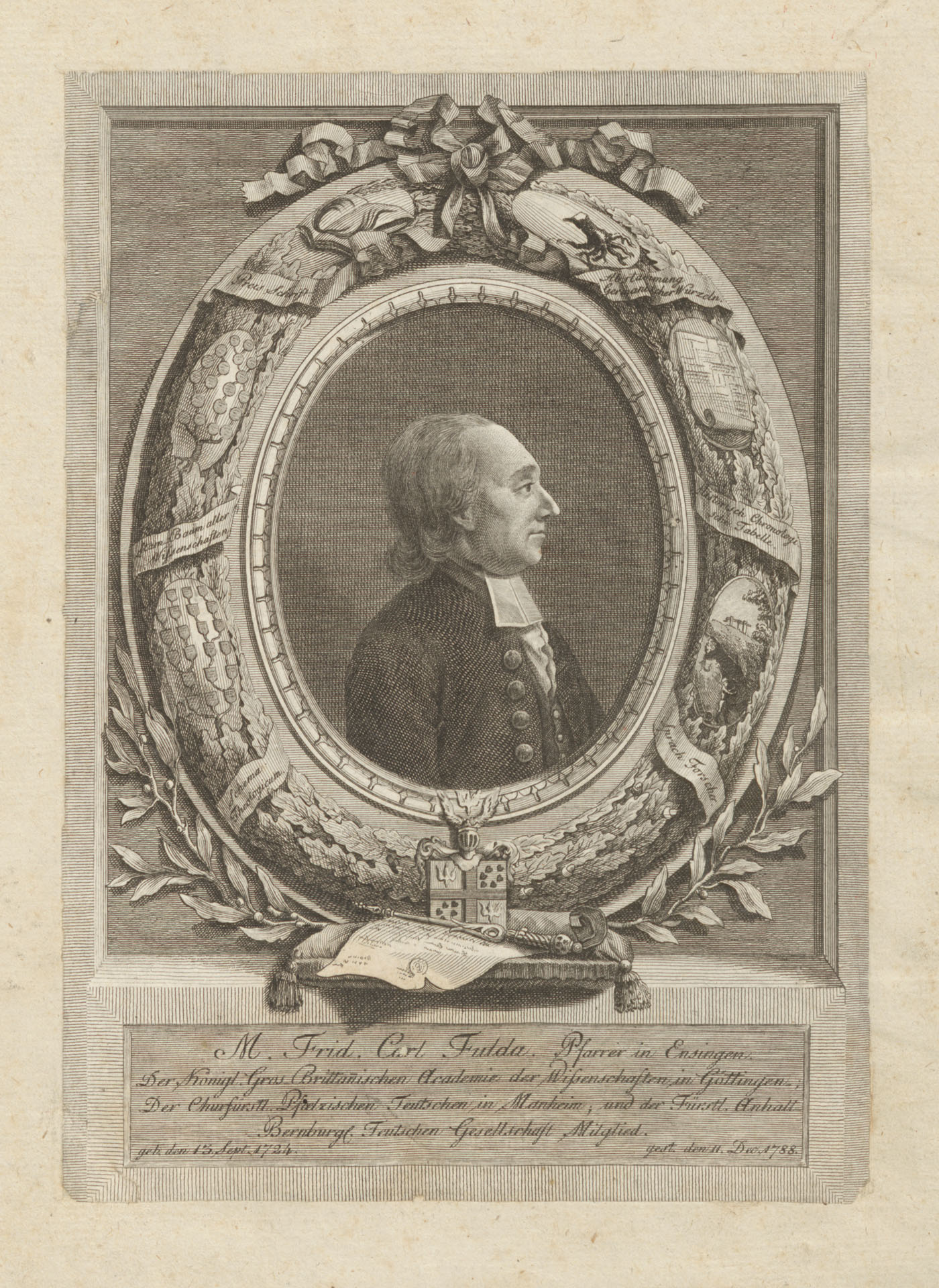 Porträt aus dem von F.C. Fulda veröffentlichten Werk "Ulfilas Gothische Bibelübersetzung" (1805)